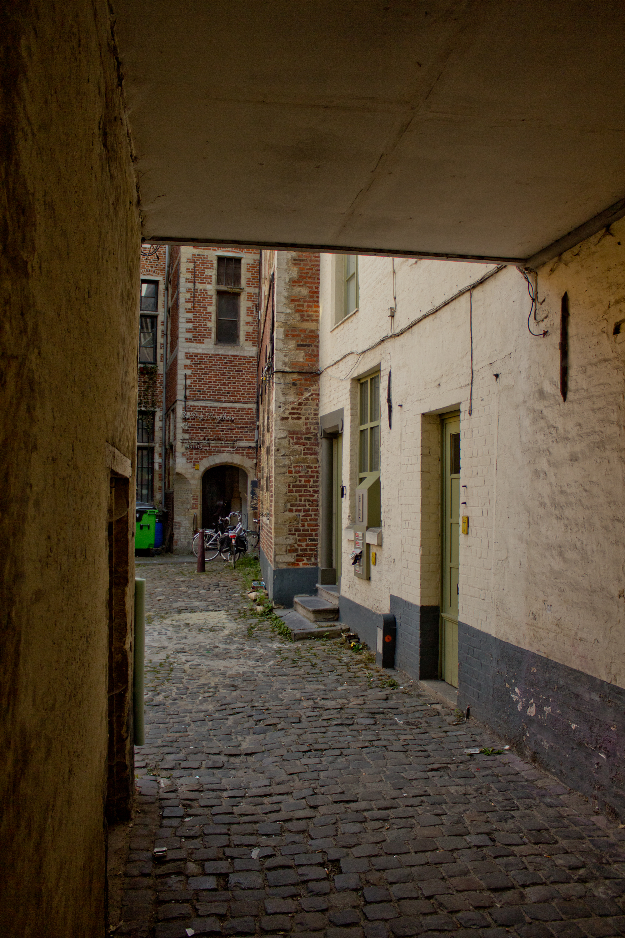 Busleidengang en Collegium Trilingue, Leuven.